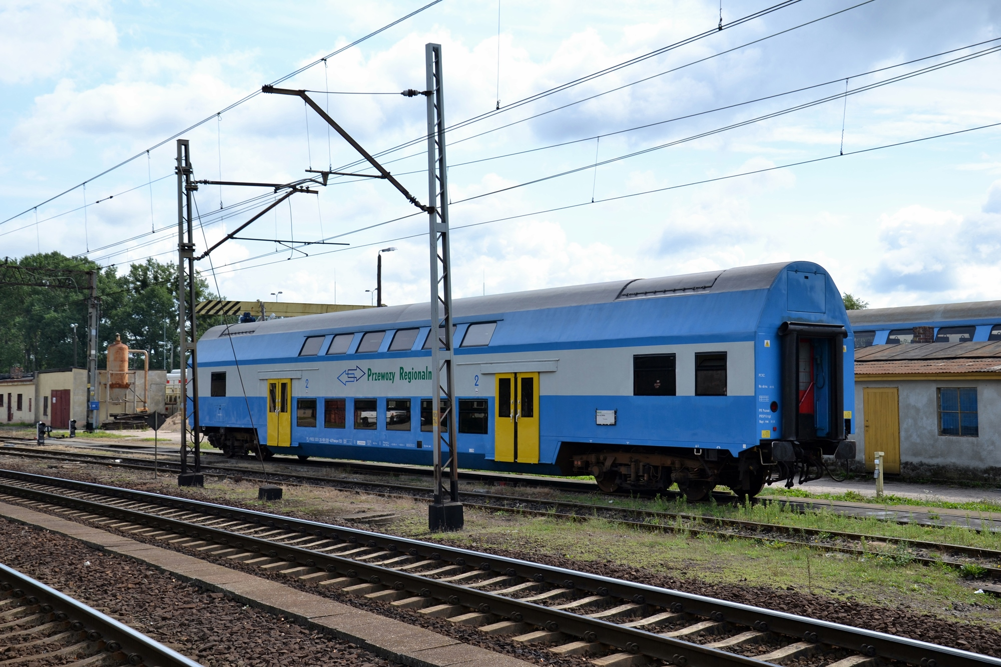 Wagon piętrowy Bmnopux w najnowszych barwach spółki Przewozy Regionalne na stacji w Krzyżu